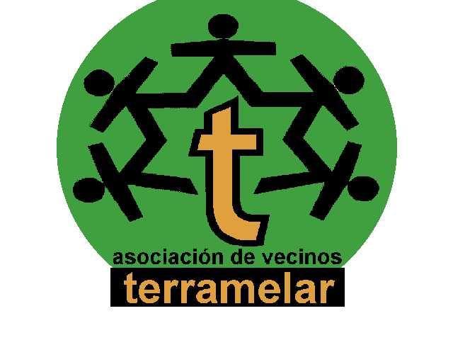 logo de la asociacion de vecinos de terramelar